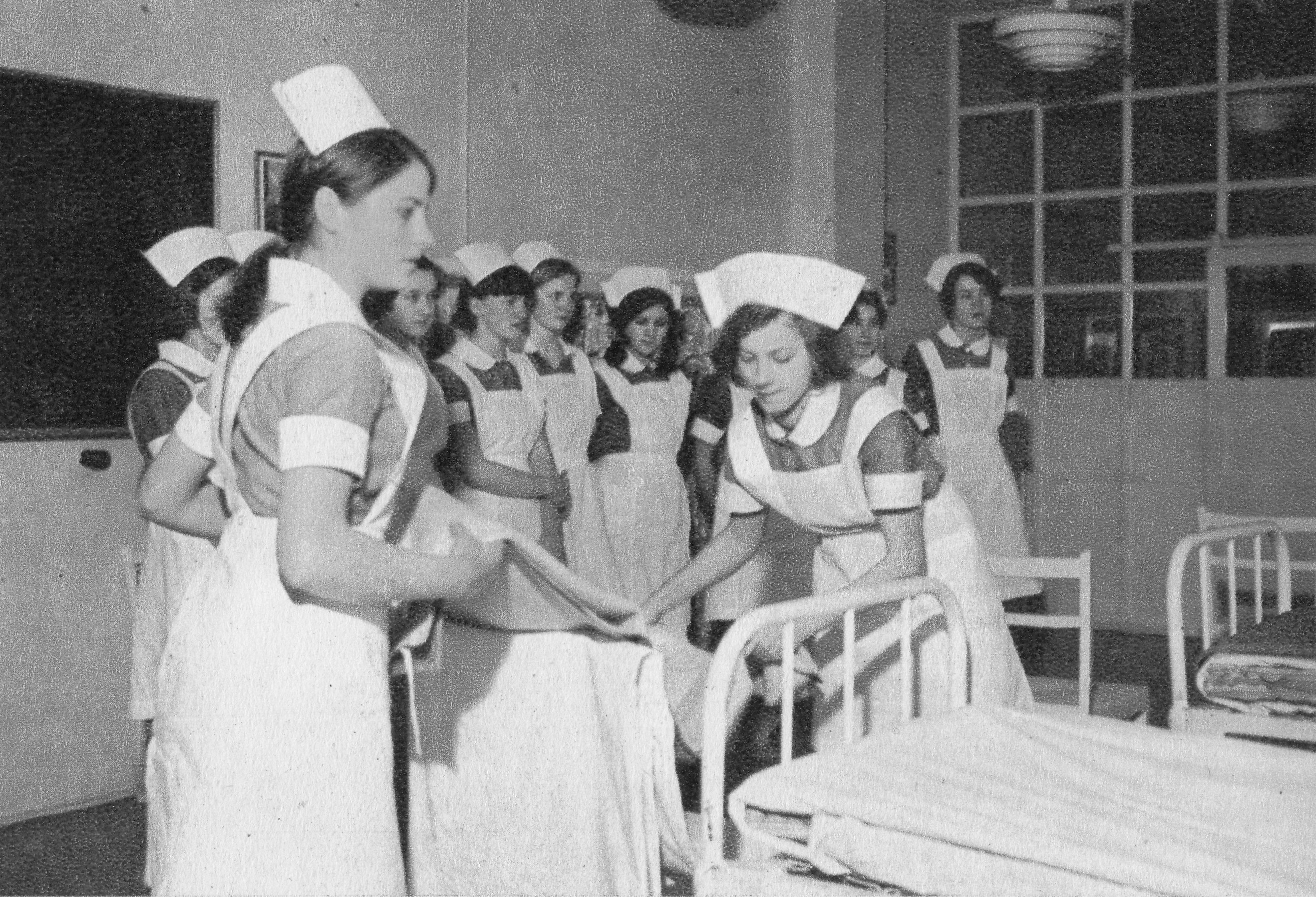 Zajęcia praktyczne w szkole pięlegniarek przy ul. Ciołka w Warszawie